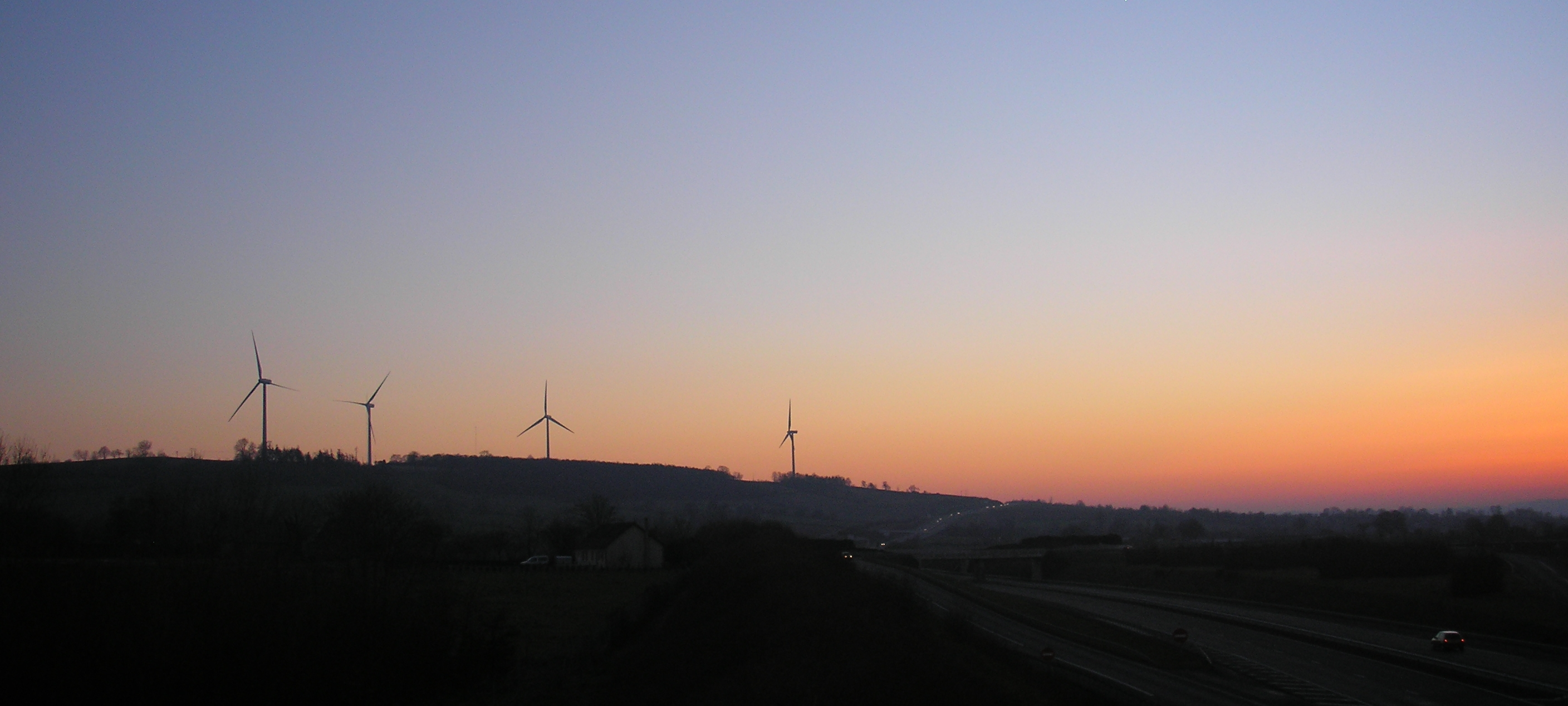 Guilberville (Normandie, France). Parc éolien (4 x 2MW) du Hamel au Brun, à proximité de l'autoroute A84 (au centre).